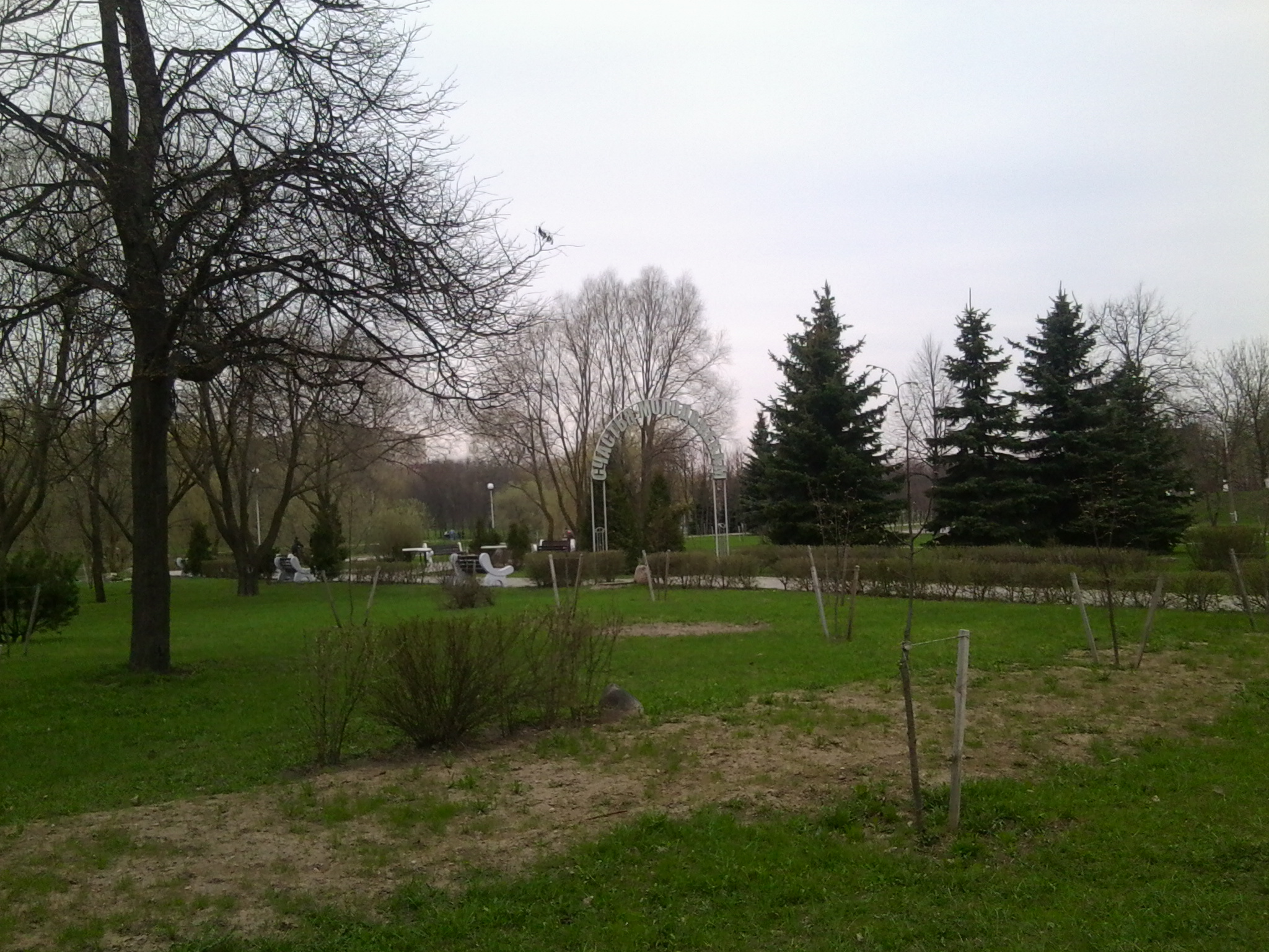 Антоновский парк расположен в Партизанском районе города Минска